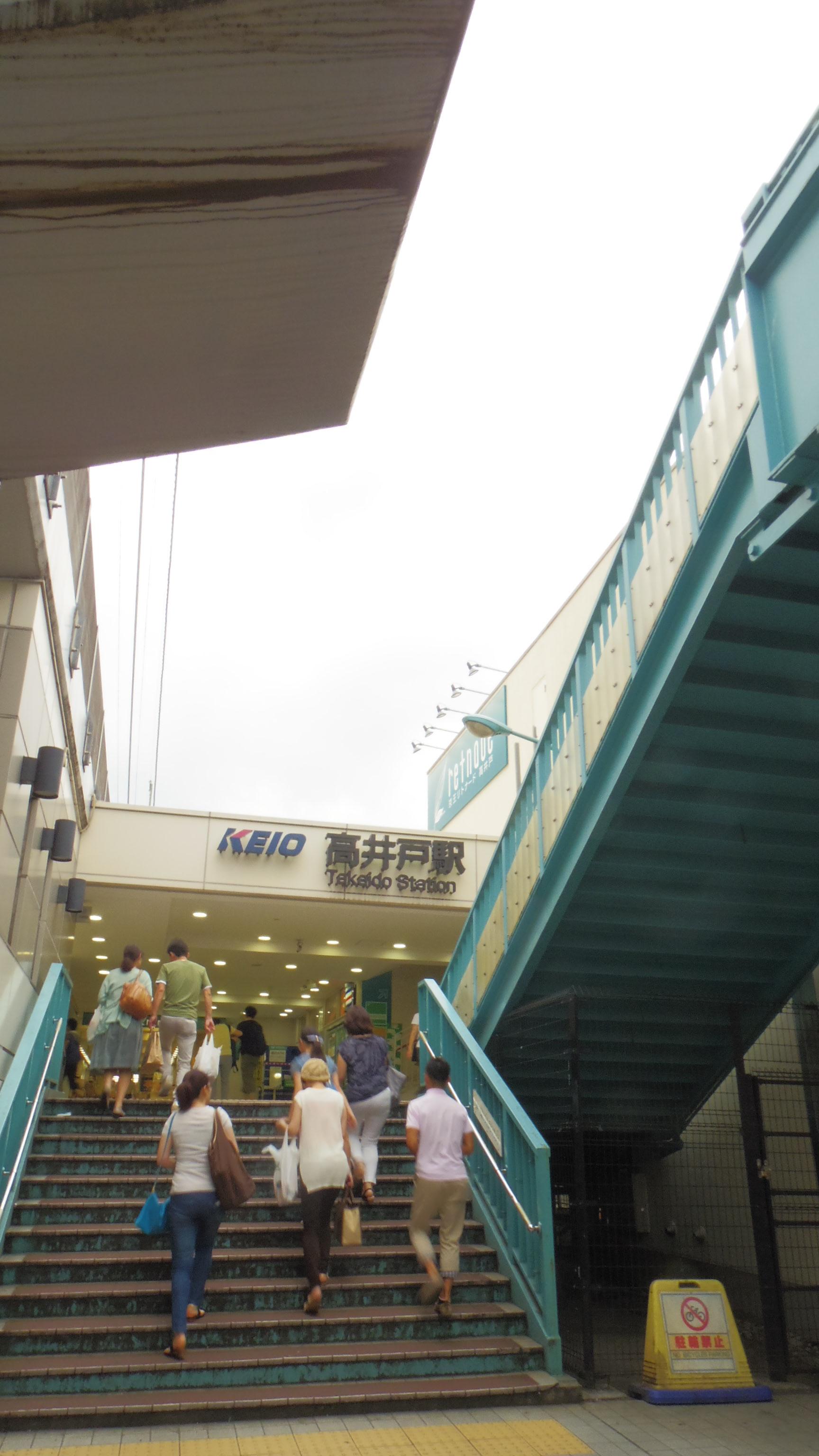 京王井の頭線高井戸駅（2016年6月19日撮影）